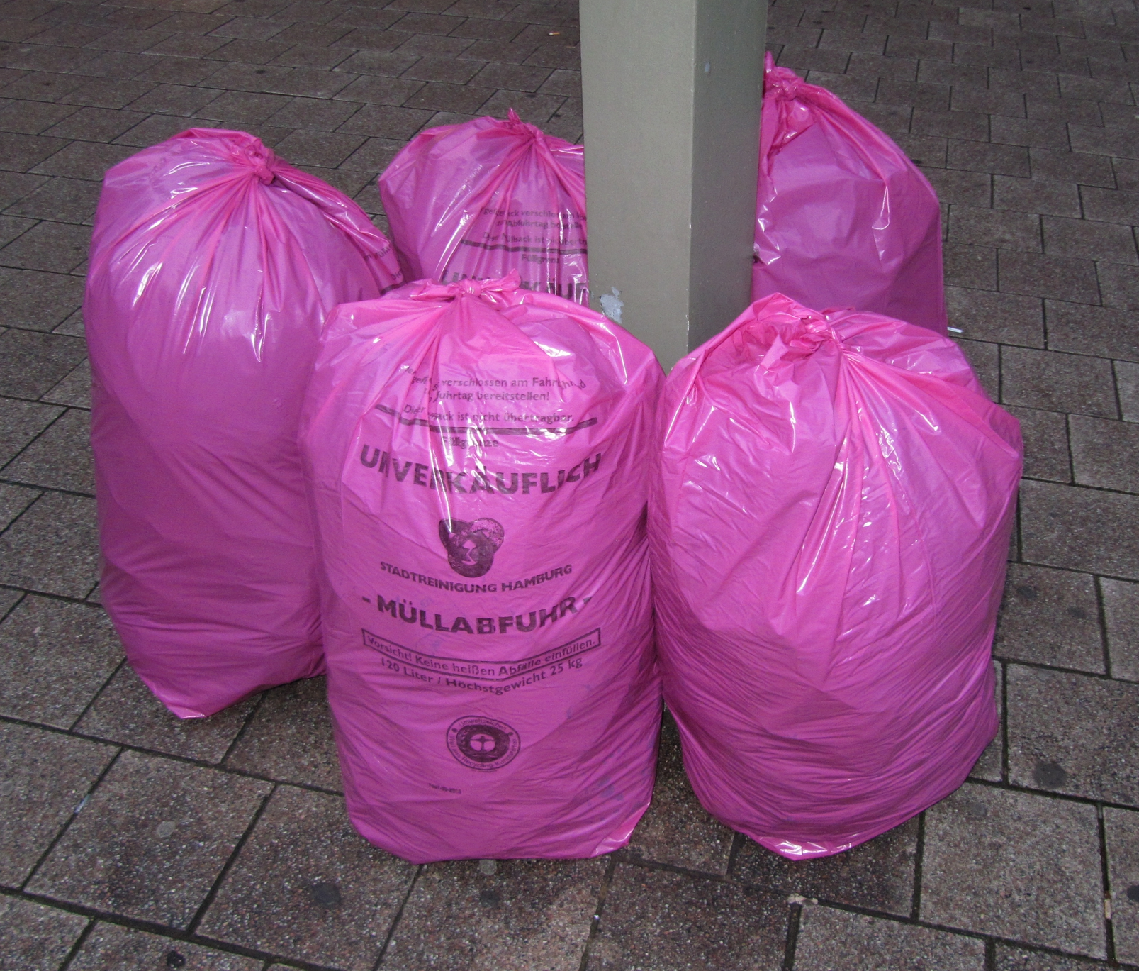 Müllsäcke in Hamburg auf der Mönckebergstraße